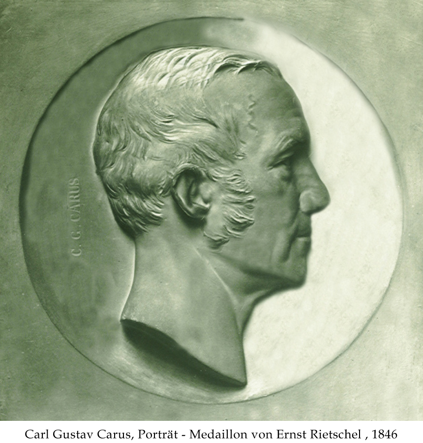 Carl Gustav Carus (1789 - 1869) war ein Dresdner Arzt, Maler, Philosoph und Schriftsteller . Sein Schwiegersohn, der Bildhauer Ernst Rietschel schuf dieses Porträt-Medaillon im Jahre 1845. Ein Bronzeabguss schmückt die Carus- Grabstätte auf dem Trinitatisfriedhof in Dresden, ein weiterer Abguss befindet sich im Treppenhaus des Rektoratsgebäudes der Medizinischen Fakultät, die seinen Namen trägt auf der Fiedlerstraße in Dresden.